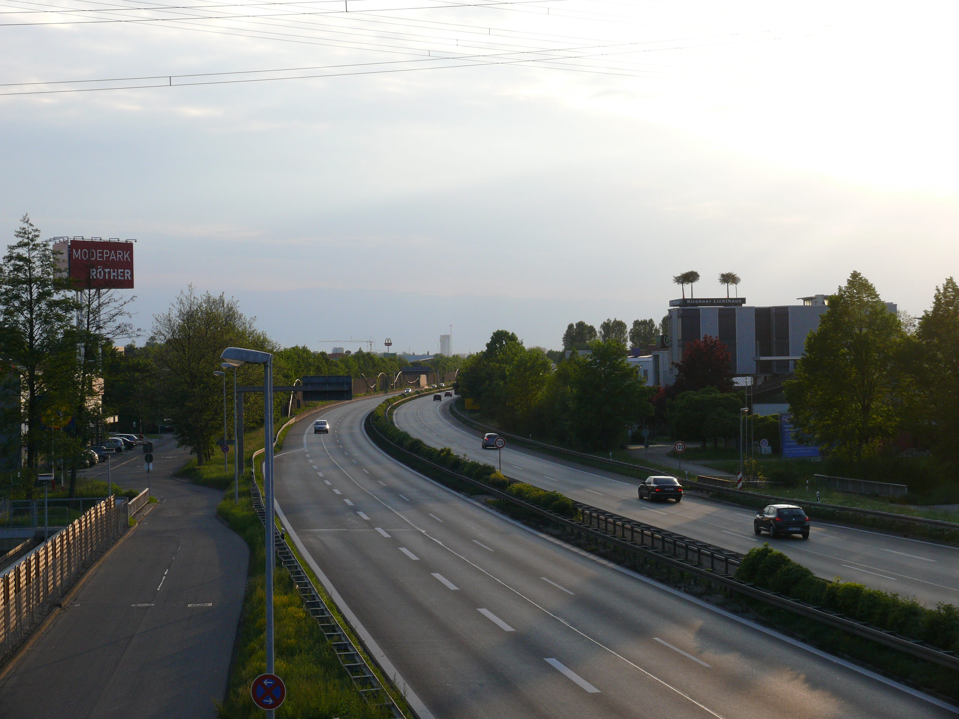 Die B29 im Bereich Weinstadt